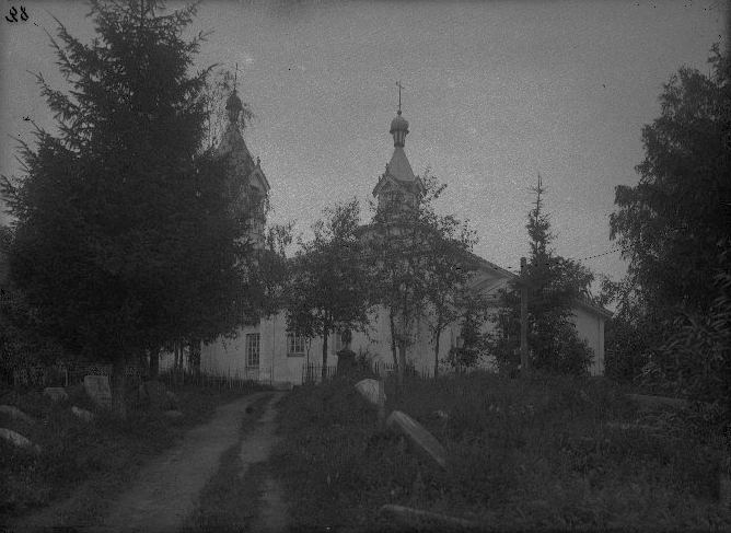 Беларуская (тарашкевіца): Клецак (Klecak), вуліца Нясьвіская (vulica Niaśviskaja). Царква-мураўёўка